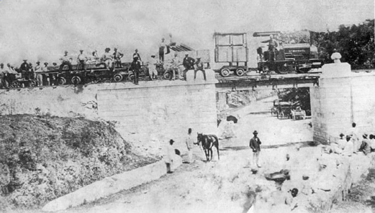 Dampflokomotive St Michael auf der Belly Gully Bridge der Barbados Railway wärend der Bauarbeiten vom 23. Juni 1877 bis 20. Oktober 1881